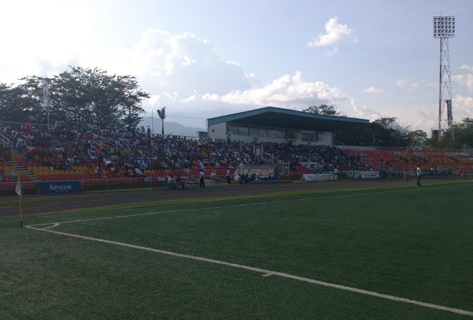 Estadio Manuel Calle Lombana - Villavicencio, Colombia